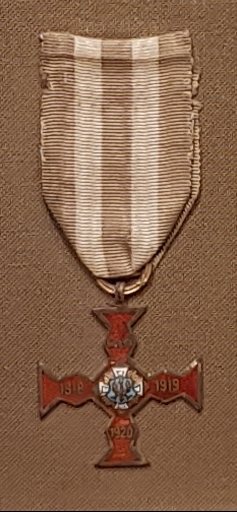 Krzyż Powstańców Wołyńskich – zbiory w kolekcji Muzeum Wojska Polskiego w Warszawie